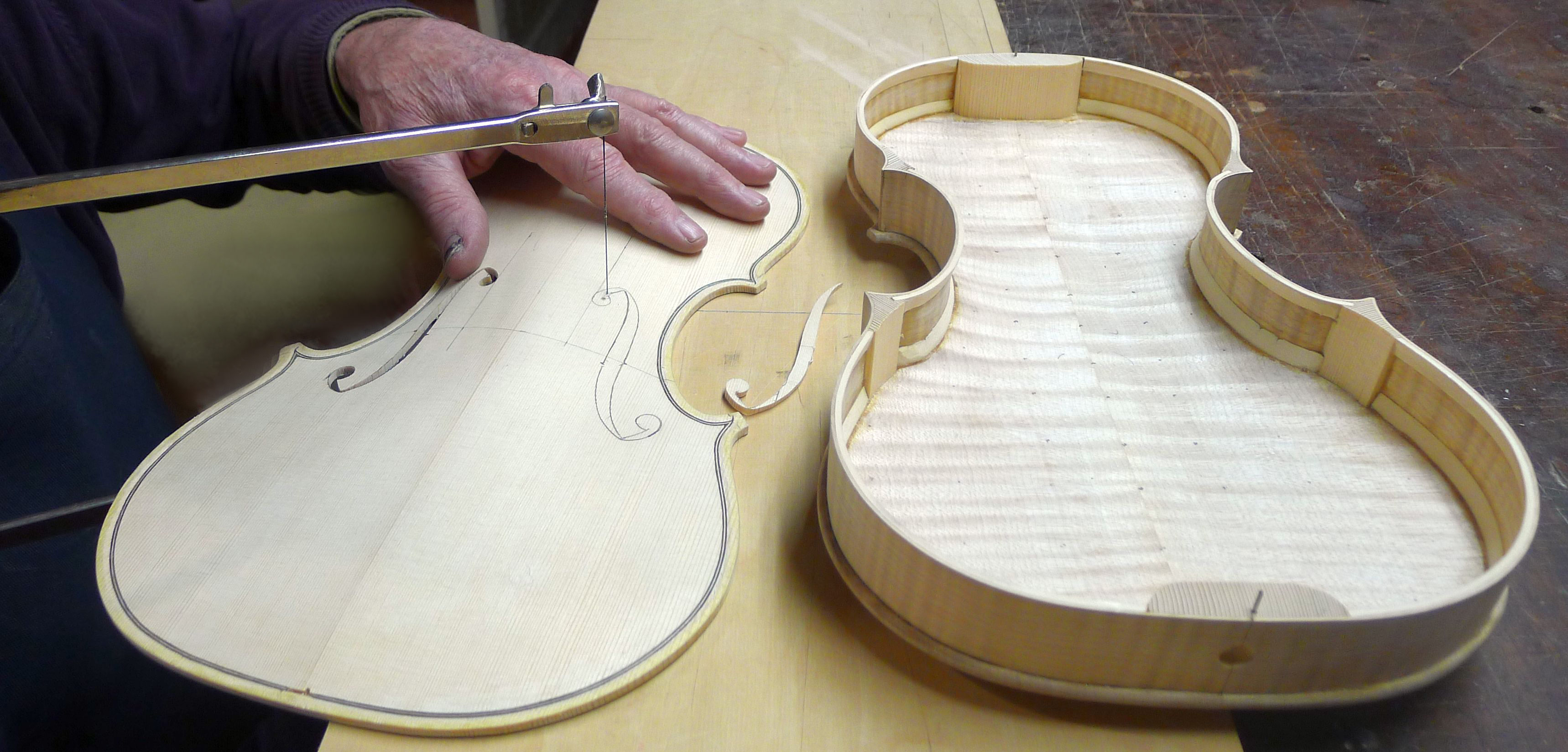 Vioolbouwer Theo Dekker uit Zutphen toont het professionele gebruik van de figuurzaag in zijn atelier. Vioolbouwers maken er de f-gaten in het bovenblad mee. Foto gemaakt door Philip Bosma op 7 februari 2020.